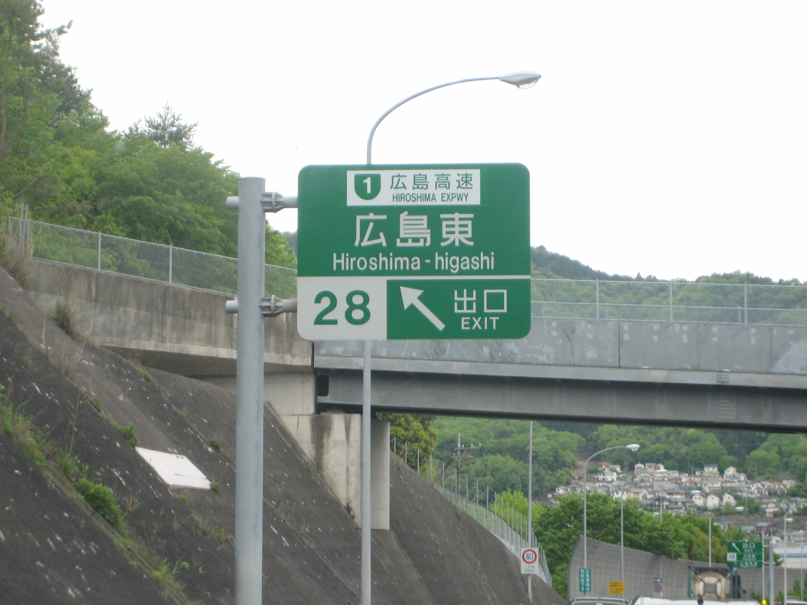 広島東ICの出口